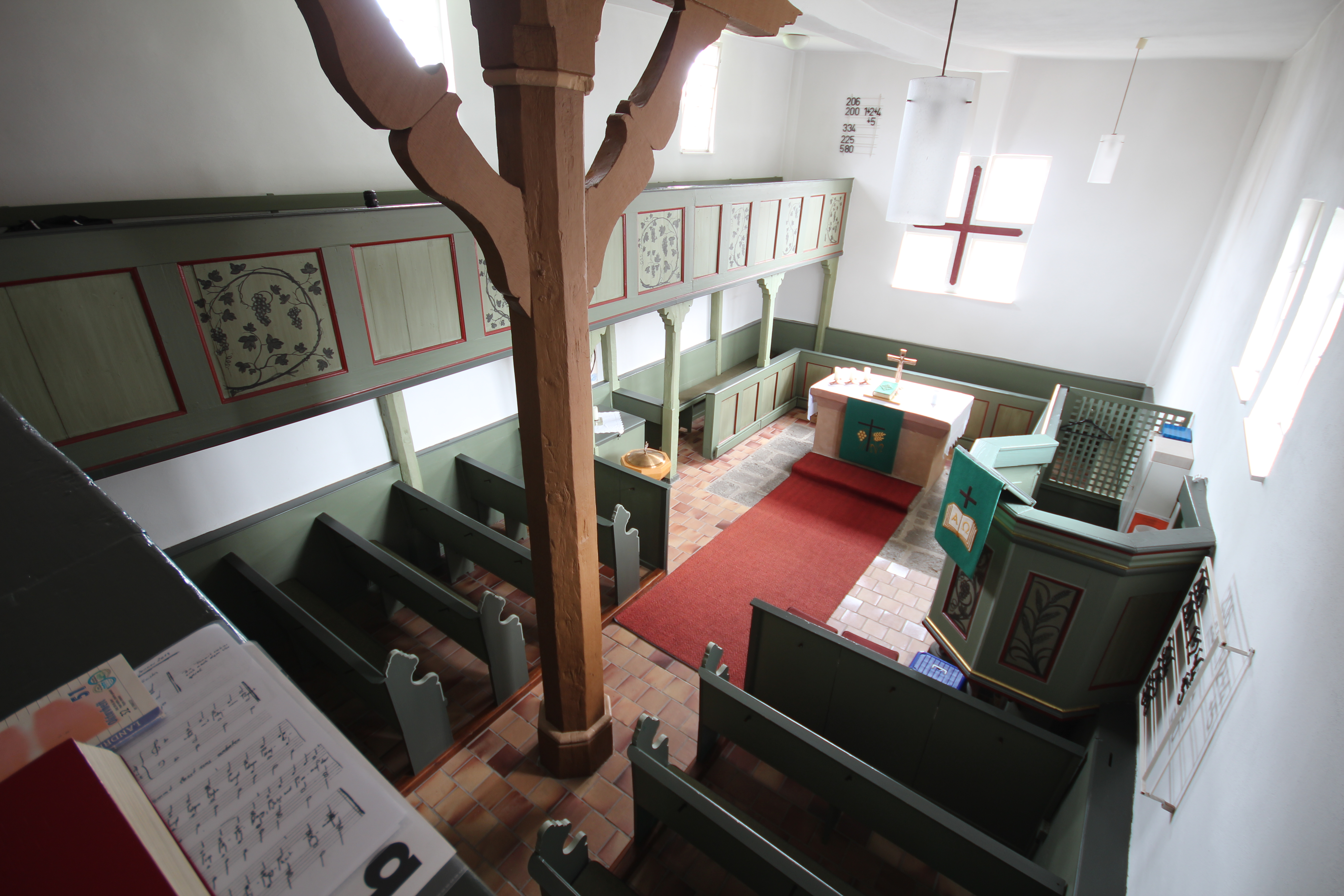 Kirche Reinhardshain, Grünberg, Gießen, Hessen, Deutschland